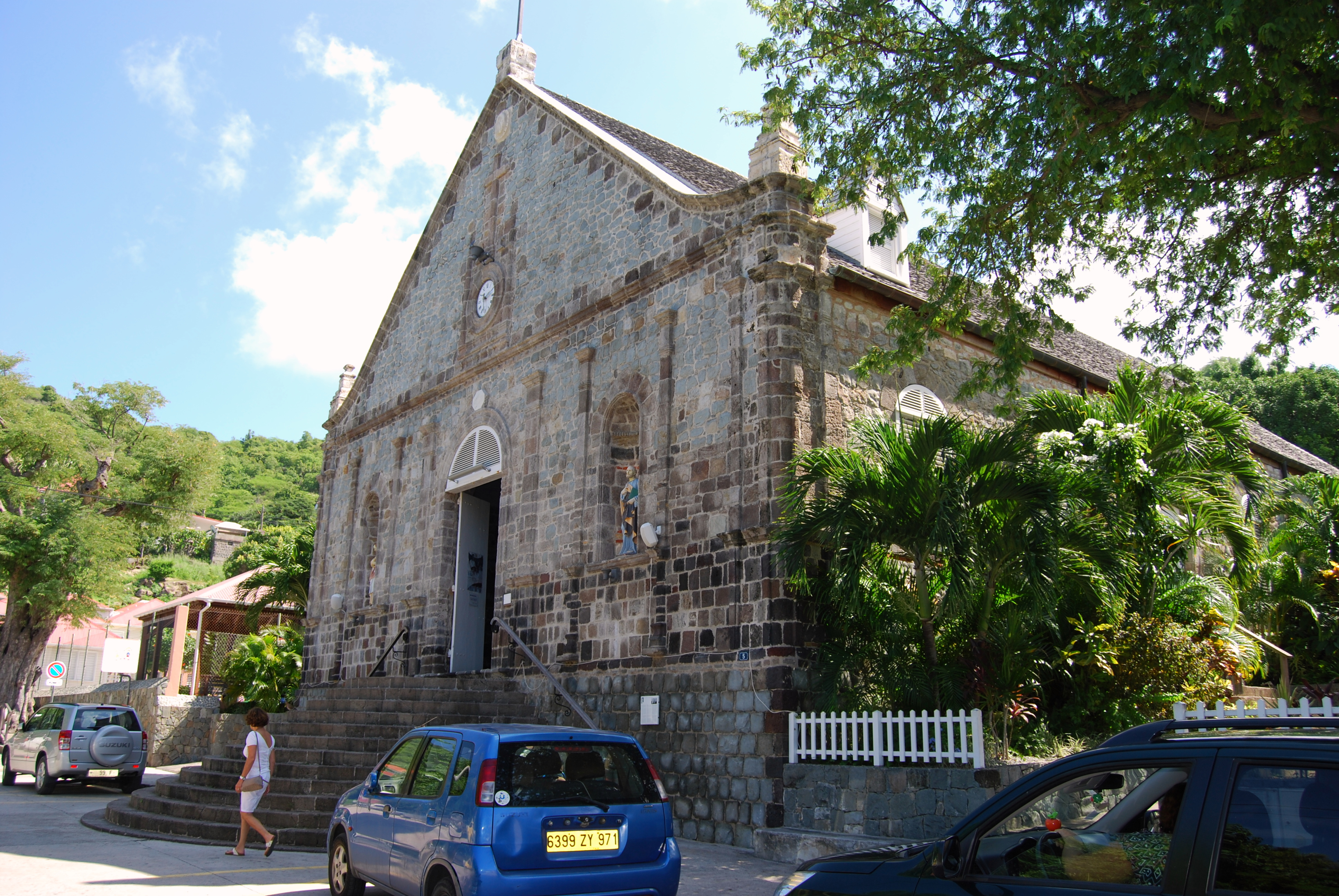 Église catholique de Gustavia, Rue de l'église, Gustavia (inscrit, 1995) .